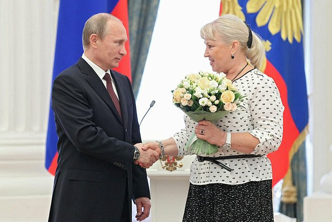 МОСКВА, КРЕМЛЬ, ЕКАТЕРИНИНСКИЙ ЗАЛ. Церемония вручения Государственных наград. Награждение орденом Александра Невского главного тренера сборной команды России по синхронному плаванию Татьяны Покровской.